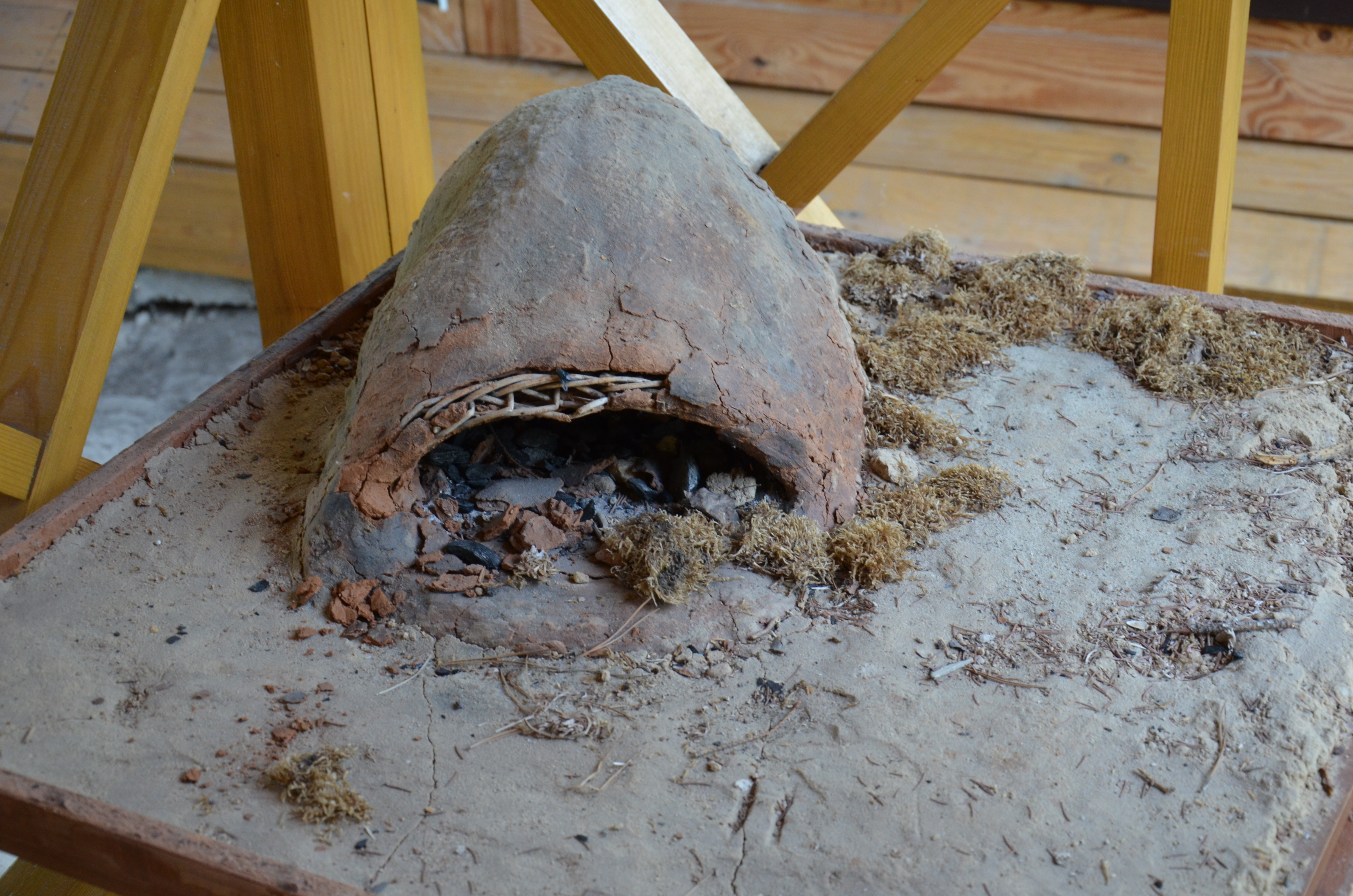 Піч гончарна, Вишгород, вул. Межигірського Спаса, 11